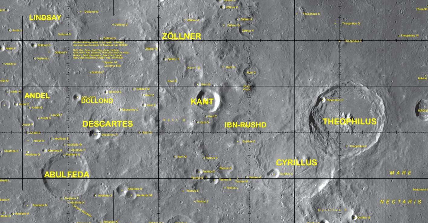 Cráter Lunar Cyrillus. Localización. (LRO)